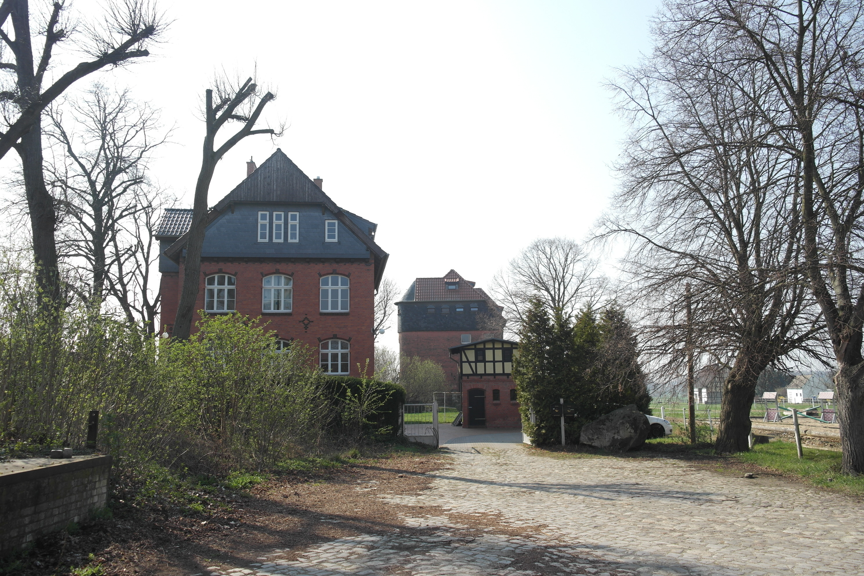 Bahnhof Blumenberg, Wohnhäuser am Bahnhof